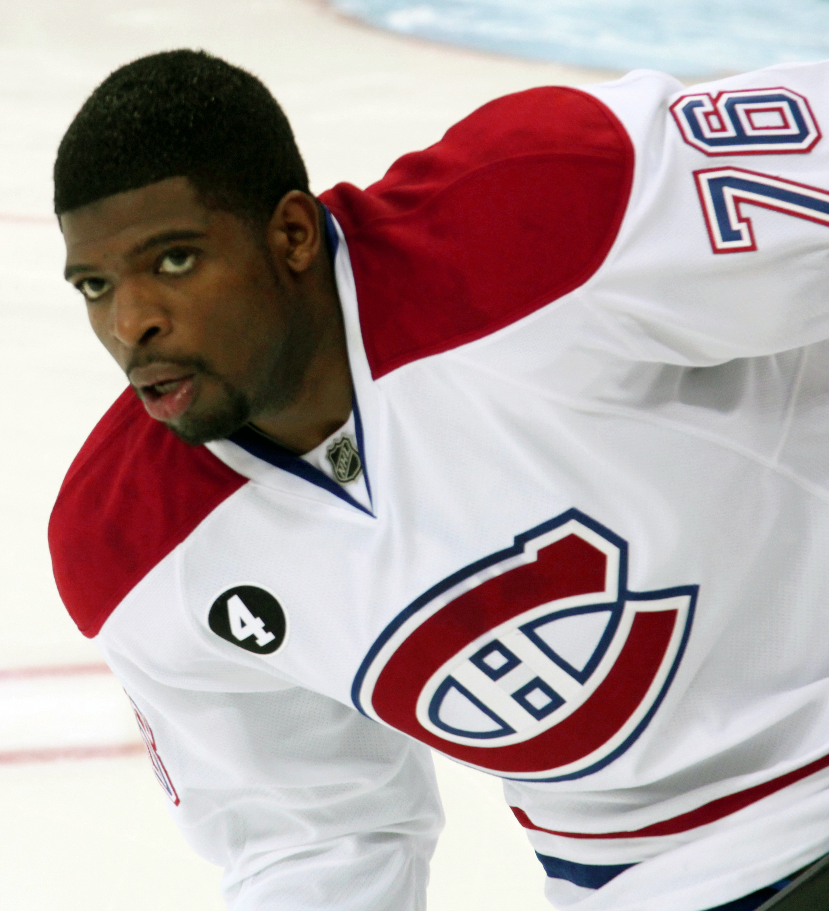 P.K Subban in January 2015.